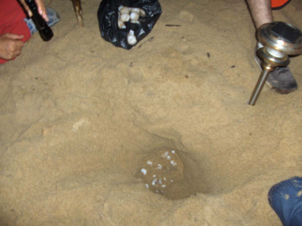 huevos de tortugaen Mayto